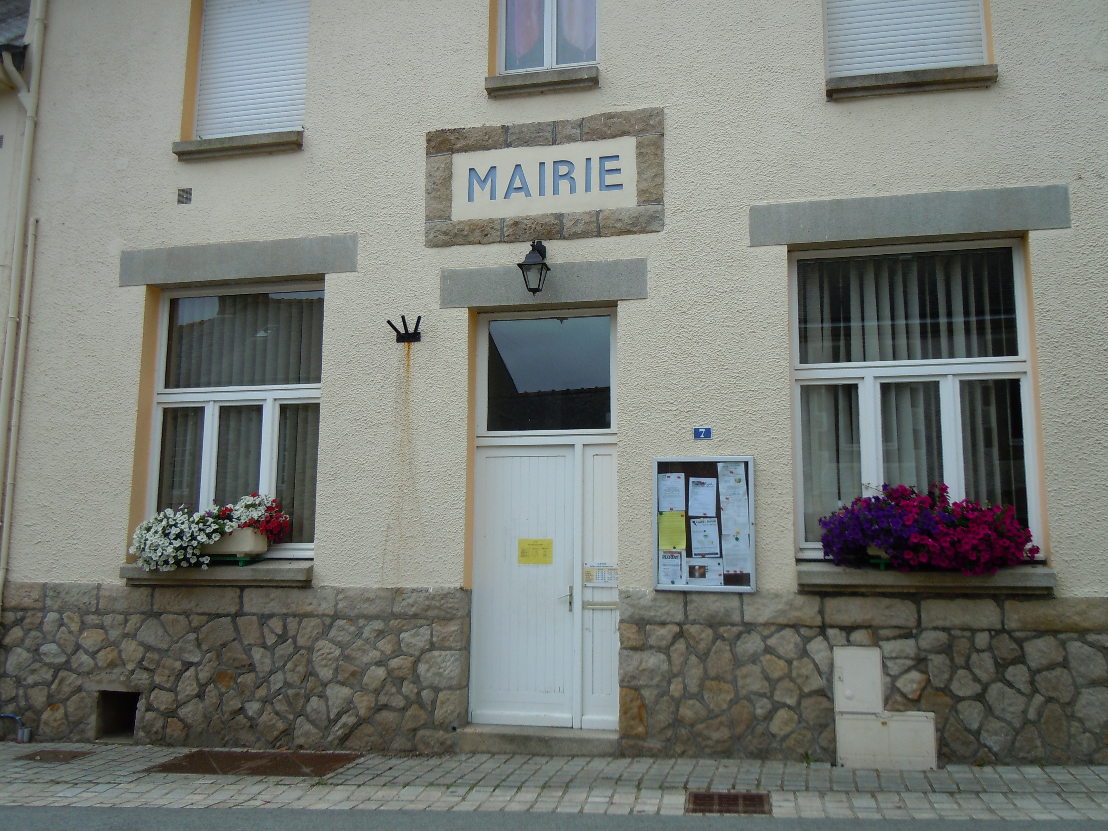 mairie de Saint-Caradec-Trégomel, département du Morbihan, France